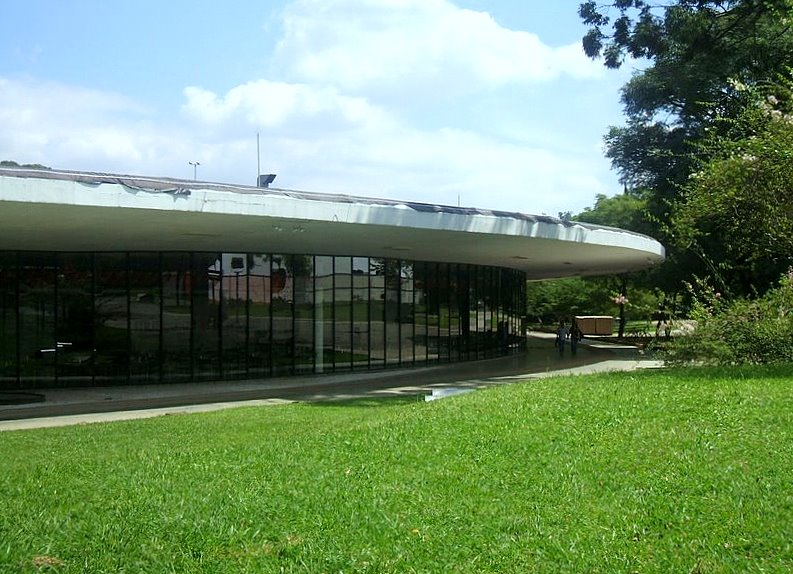 Museu de Arte Moderna de São Paulo, no Parque do Ibirapuera.